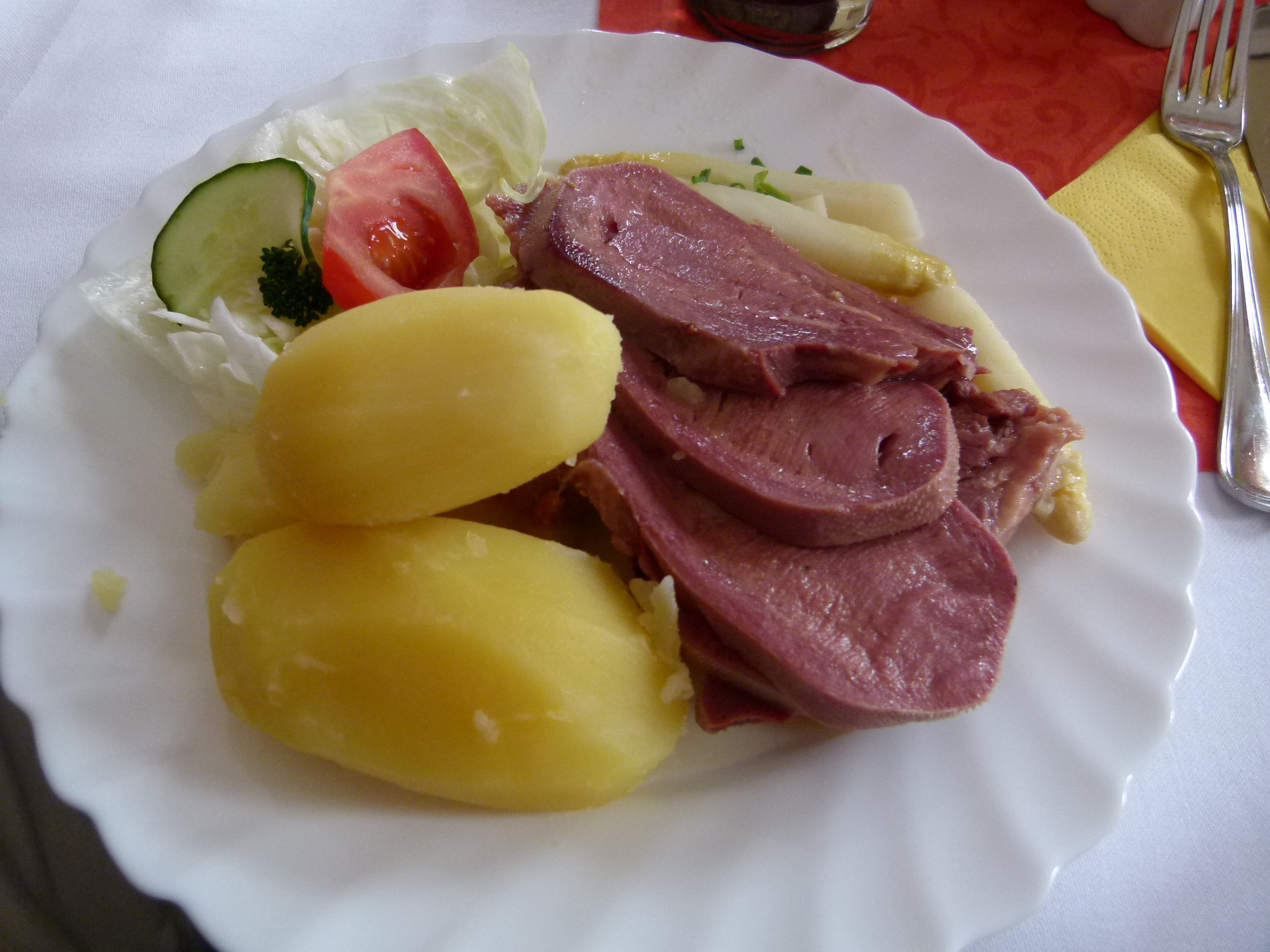 Rinderzunge mit Spargel, Gasthaus Zur alten Säge, Dorf Wehlen, Sächsische Schweiz